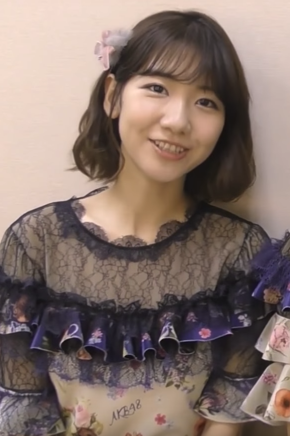 AKB48 Group大前輩 #柏木由紀 #指原莉乃 #峯岸みなみ來將經驗分享給TPE48參賽女孩們，呼籲大家要繼續支持喜歡的女孩喔！